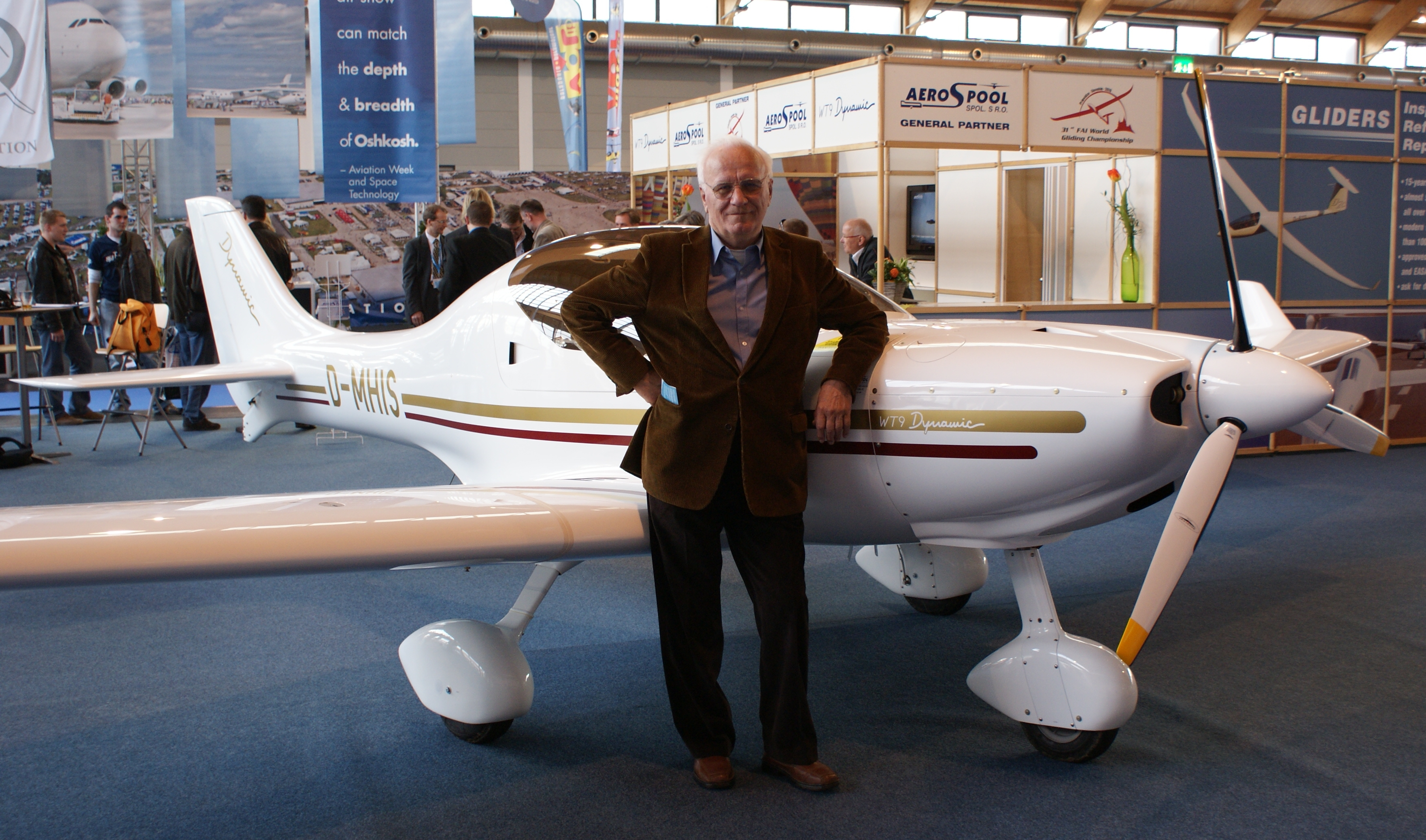 Ultralight-Aircraft 'WT-9 Dynamic', including its designer Mr. Wala. at Aero-Expo (Friedrichshafen).